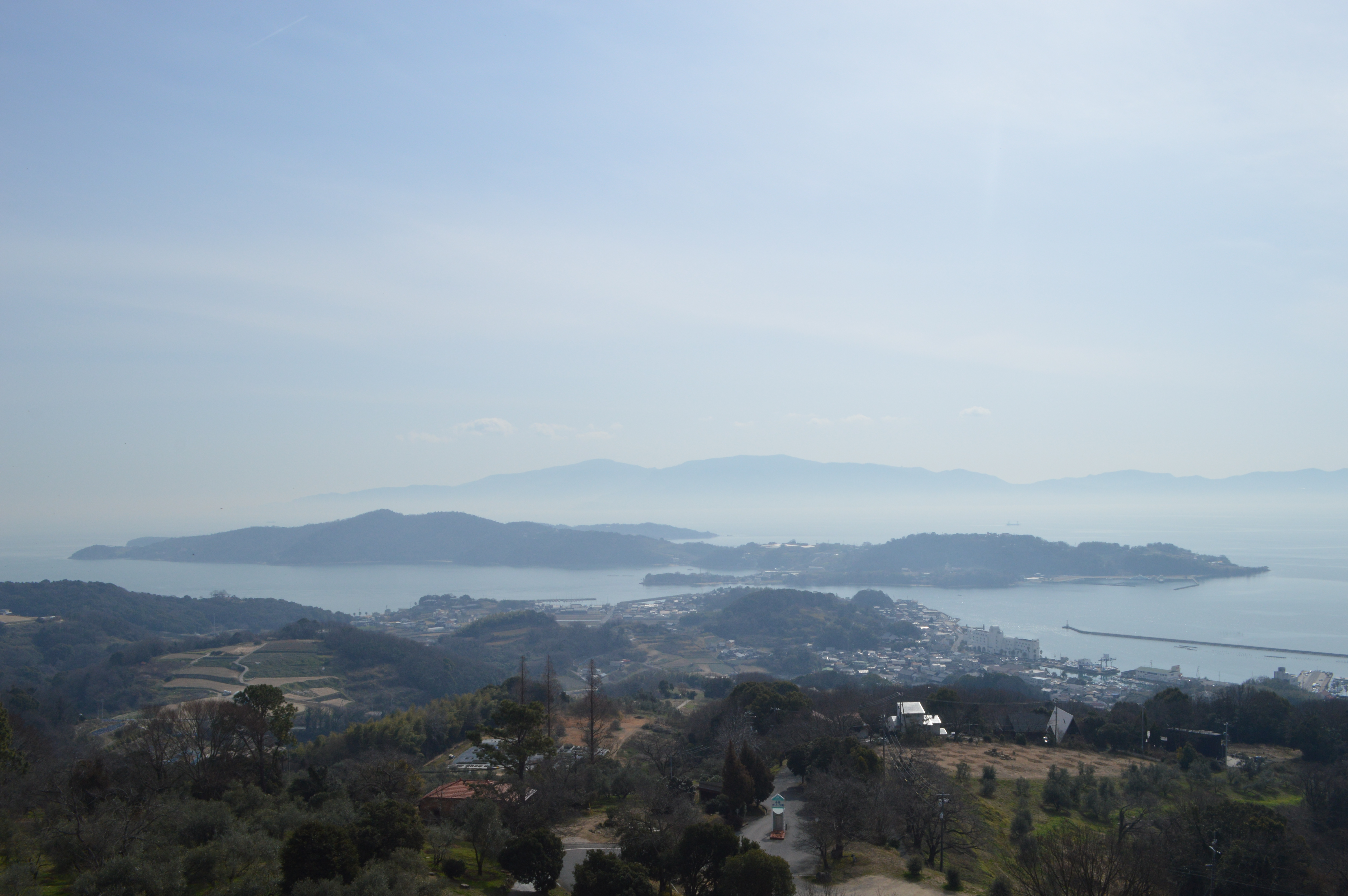 岡山県牛窓（現・瀬戸内市）の牛窓オリーブ園から見た多島海（日本のエーゲ海）